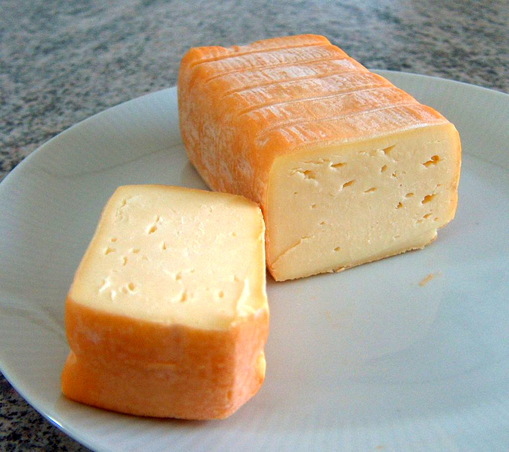 Limburger Käse, mit 40% Fett (Cheese)